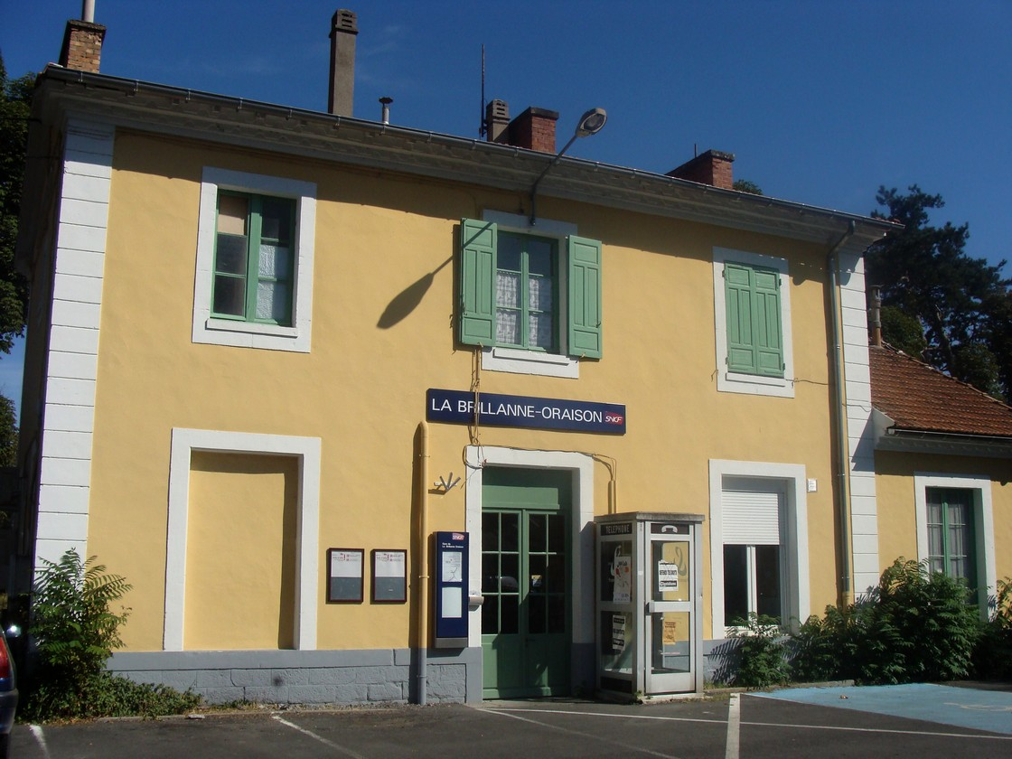 Gare de La Brillanne - Oraison, sur la ligne Marseille - Briançon, façade extérieure.